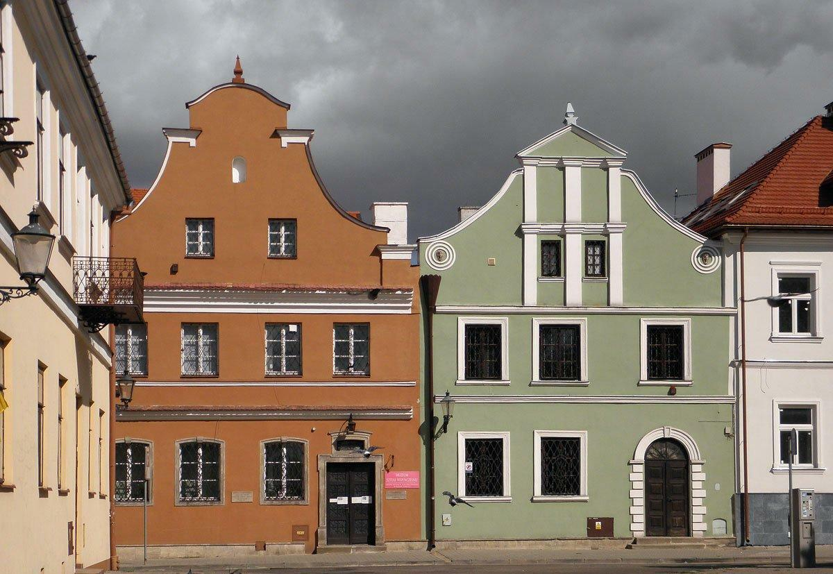 Zabytkowe domy Gąski i Esterki.